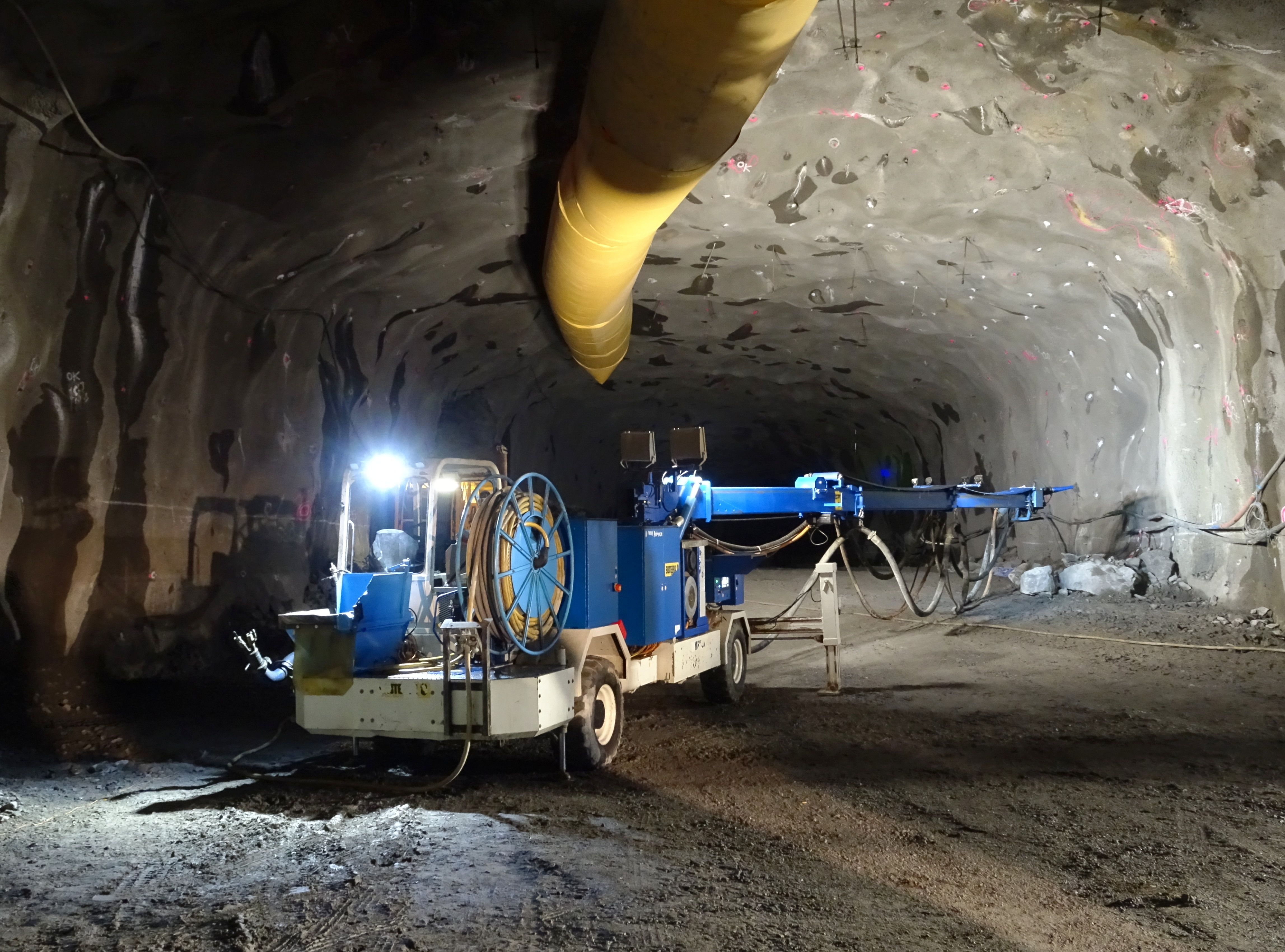 Förbifart, Skärholmen, tunnelvisning